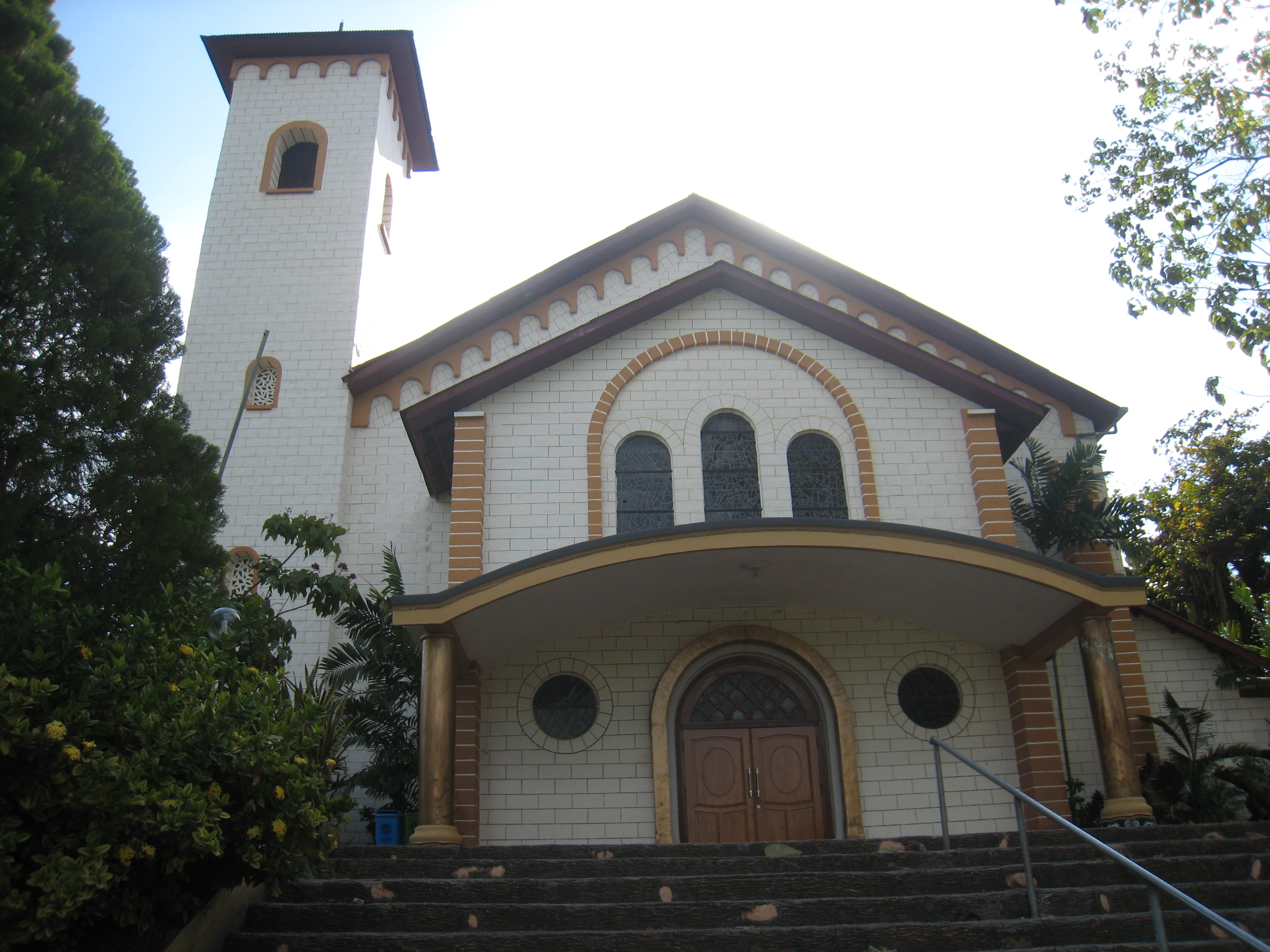 Cattedrale di Weetebula